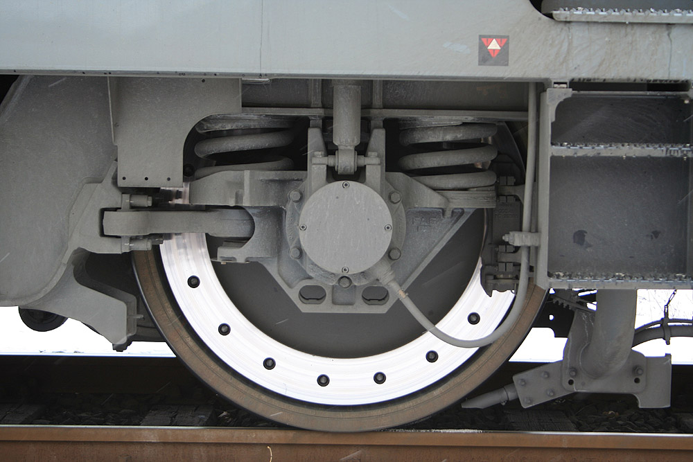 Scheibenbremse einer Lokomotive der Baureihe 189|Siemens ES64F4|Baureihe 189